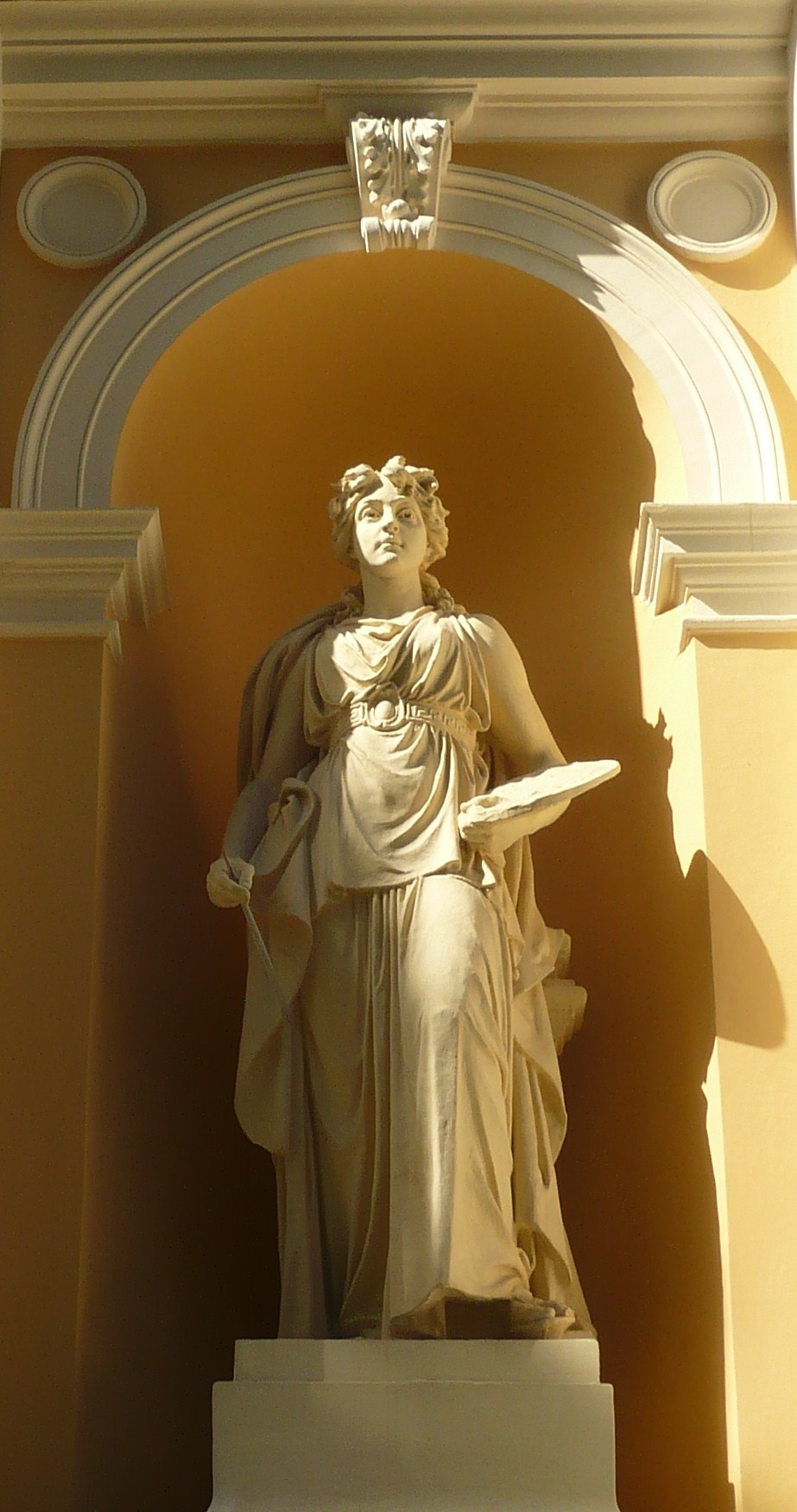 Lwów. Rzeźba na Pałacu Sztuki w Parku Stryjskim